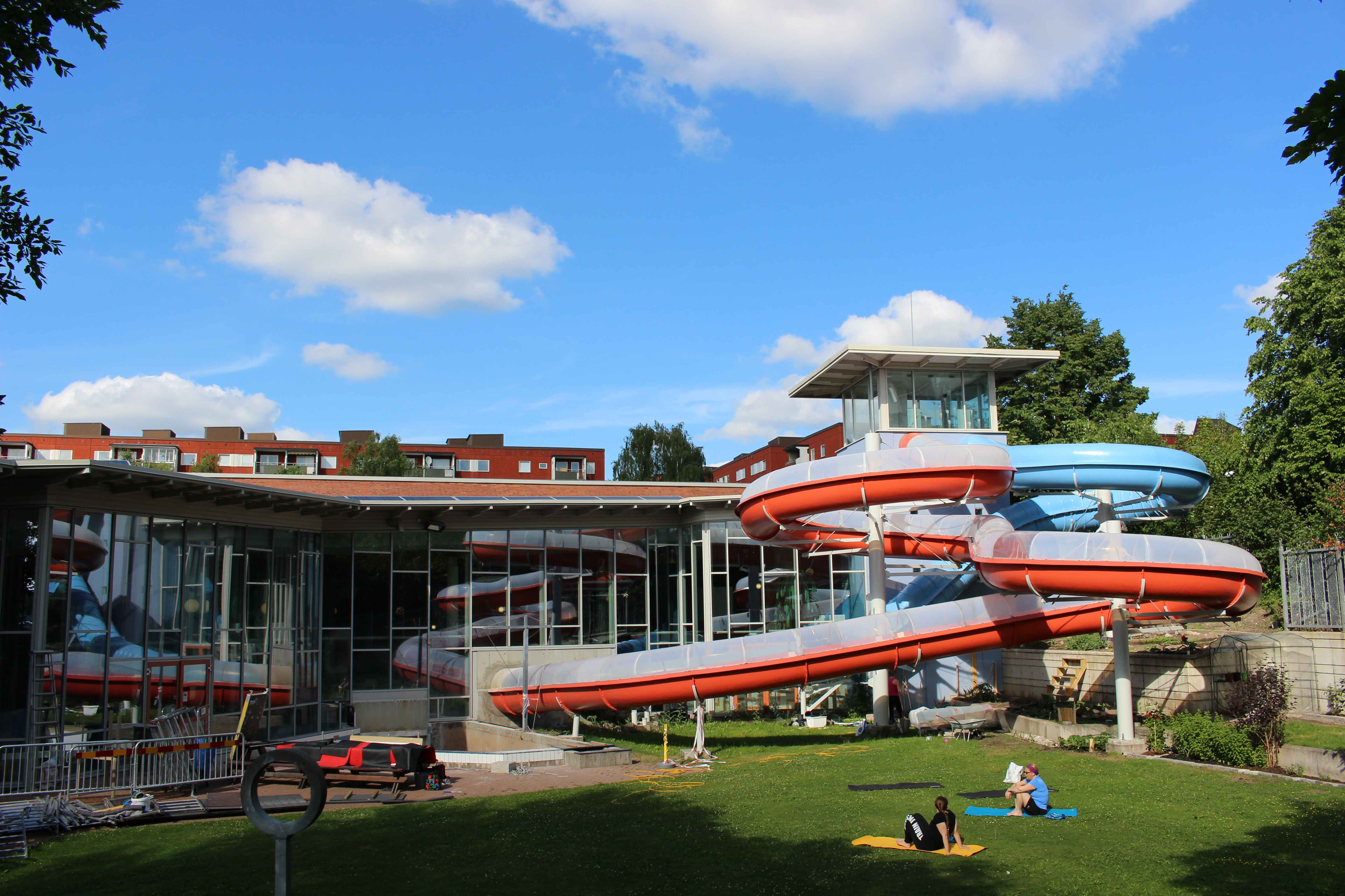 Husbybadet